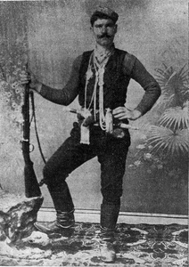 Георгиос Проимакис